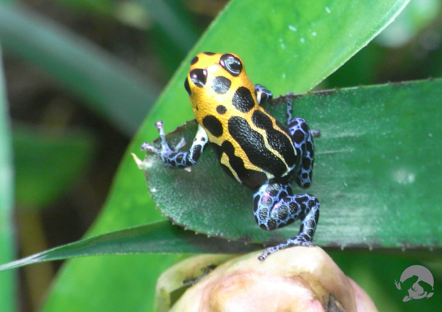 Ranitomeya imitator "Jeberos"